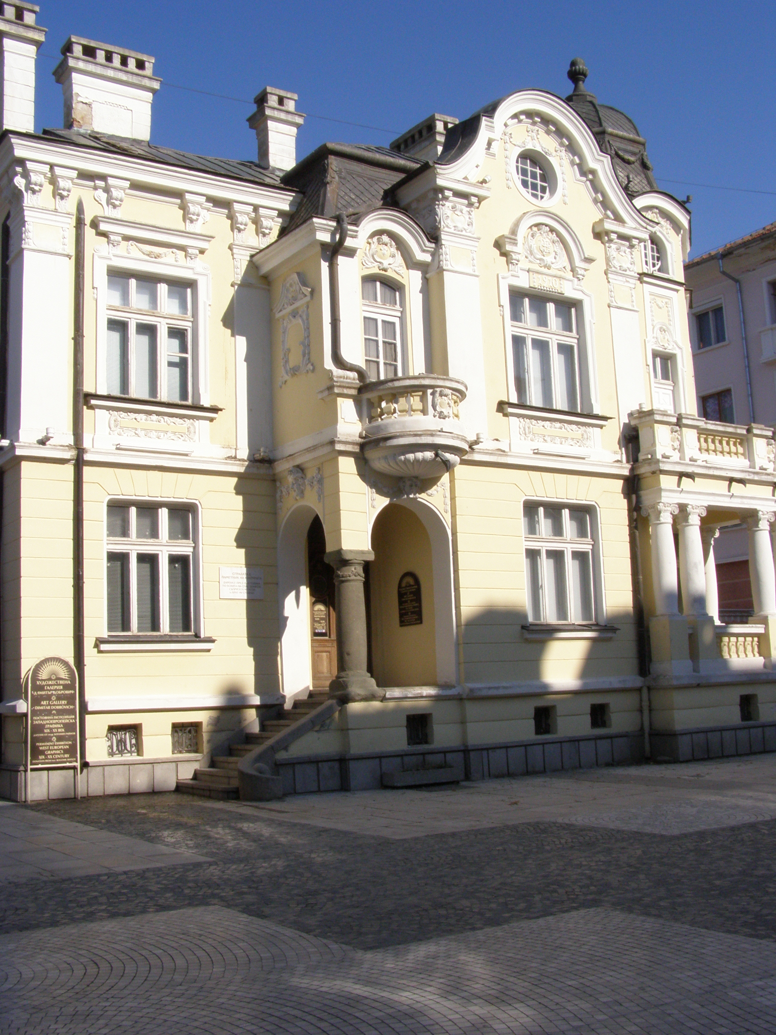 Художествена галерия "Димитър Добрович" в град Сливен.